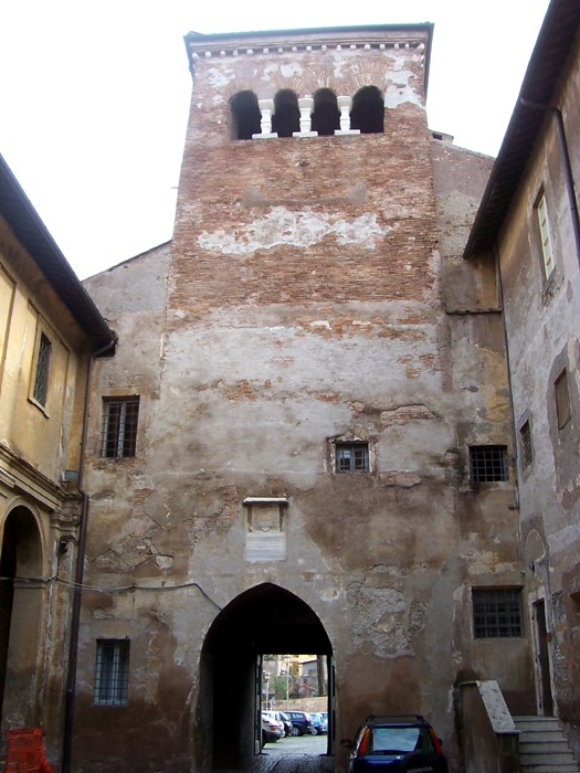 Roma - Basilica dei Ss. Quattro Coronati (torre)